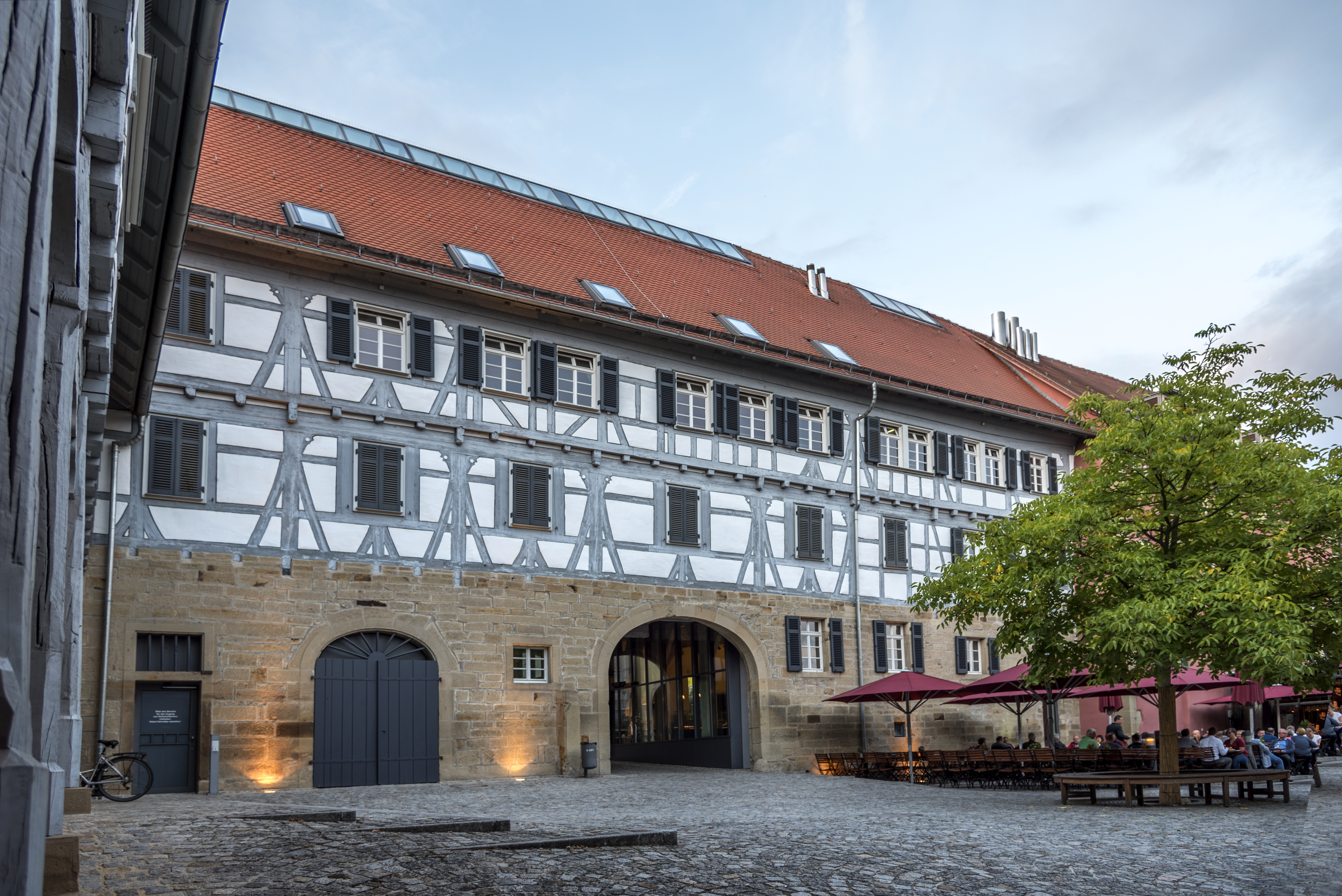 Der Innenhof des Bietigheimer Schlosses in Abendstimmung. Im Innenhof befindet sich eine Gaststätte.